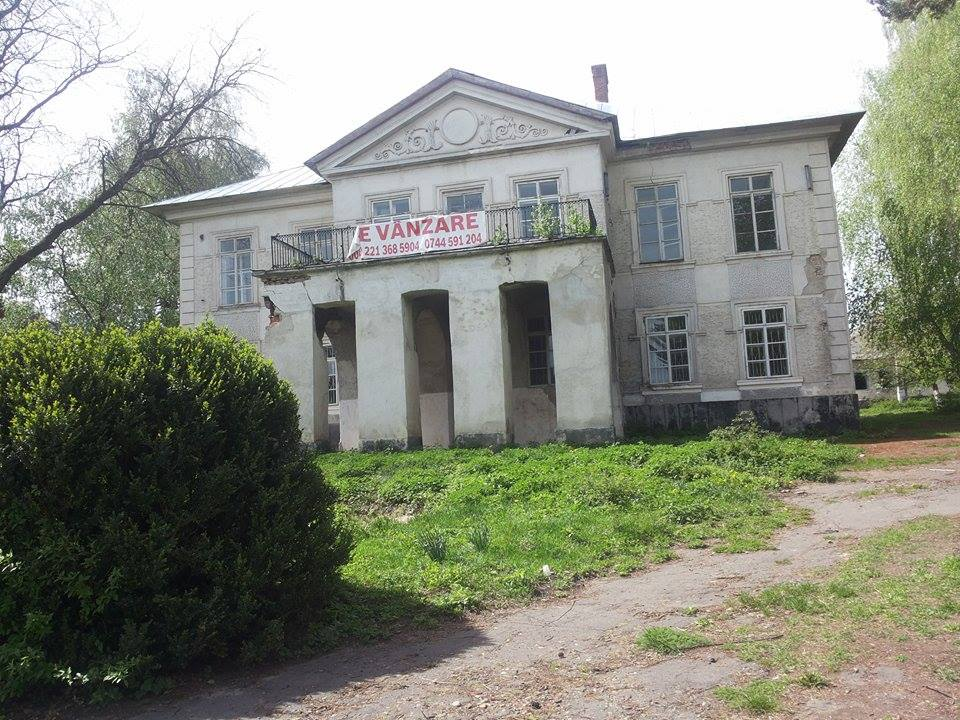 Casa Vârnav-Liteanu, fostă casă de copii, azi abandonată